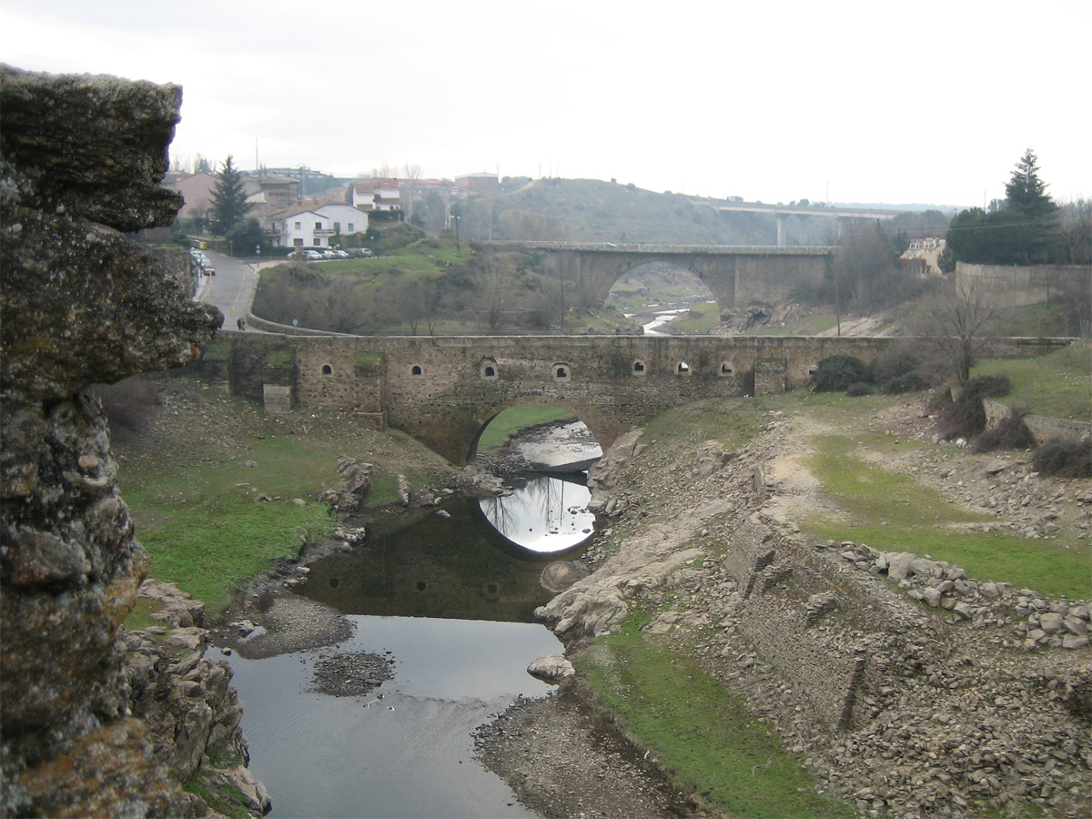 Los puentes que atraviesan el río Lozoya en la localidad de Buitrago del Lozoya. En primer término, el Puente Viejo o Puente del Arrabal; detrás de él, el Puente Nuevo; y al fondo de la imagen, el viaducto por el que transcurre la autovía A-1.